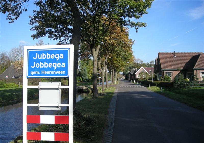 Jubbega